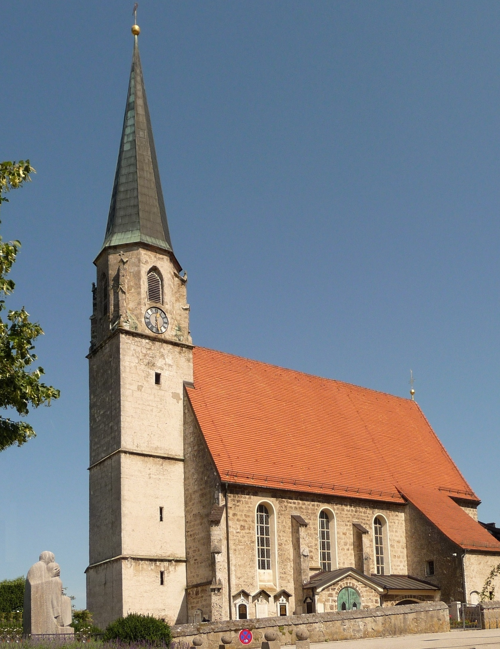 Burgkirchen, kath. Kirche St. Johann Baptist